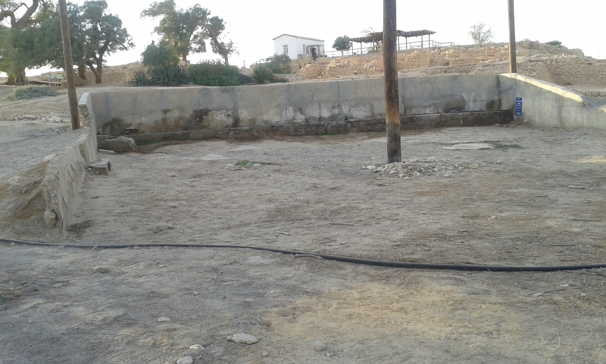 משטרת עין חוצוב - השקיית הסוסים